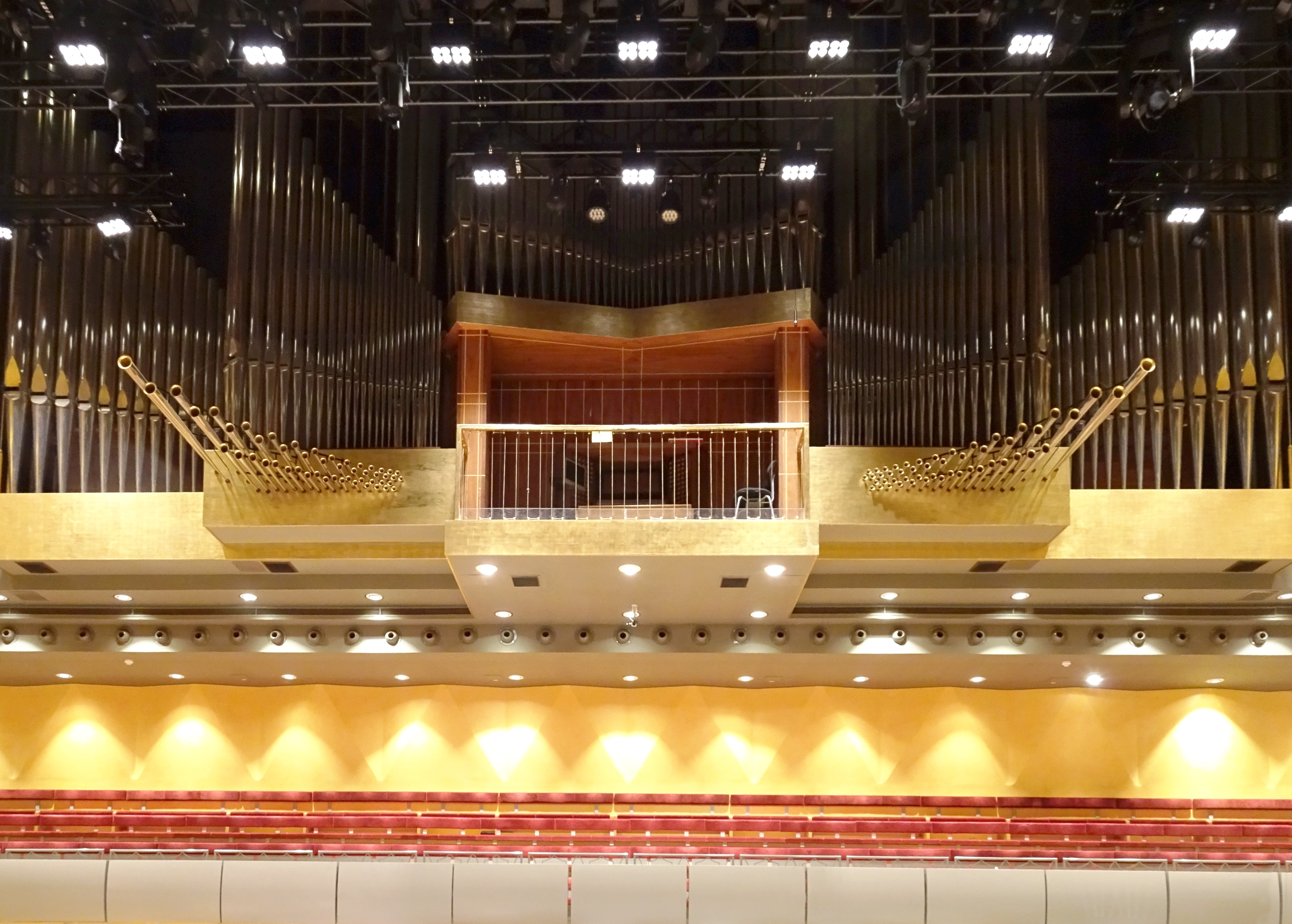 Konserthuset Stora Salongen, orgeln